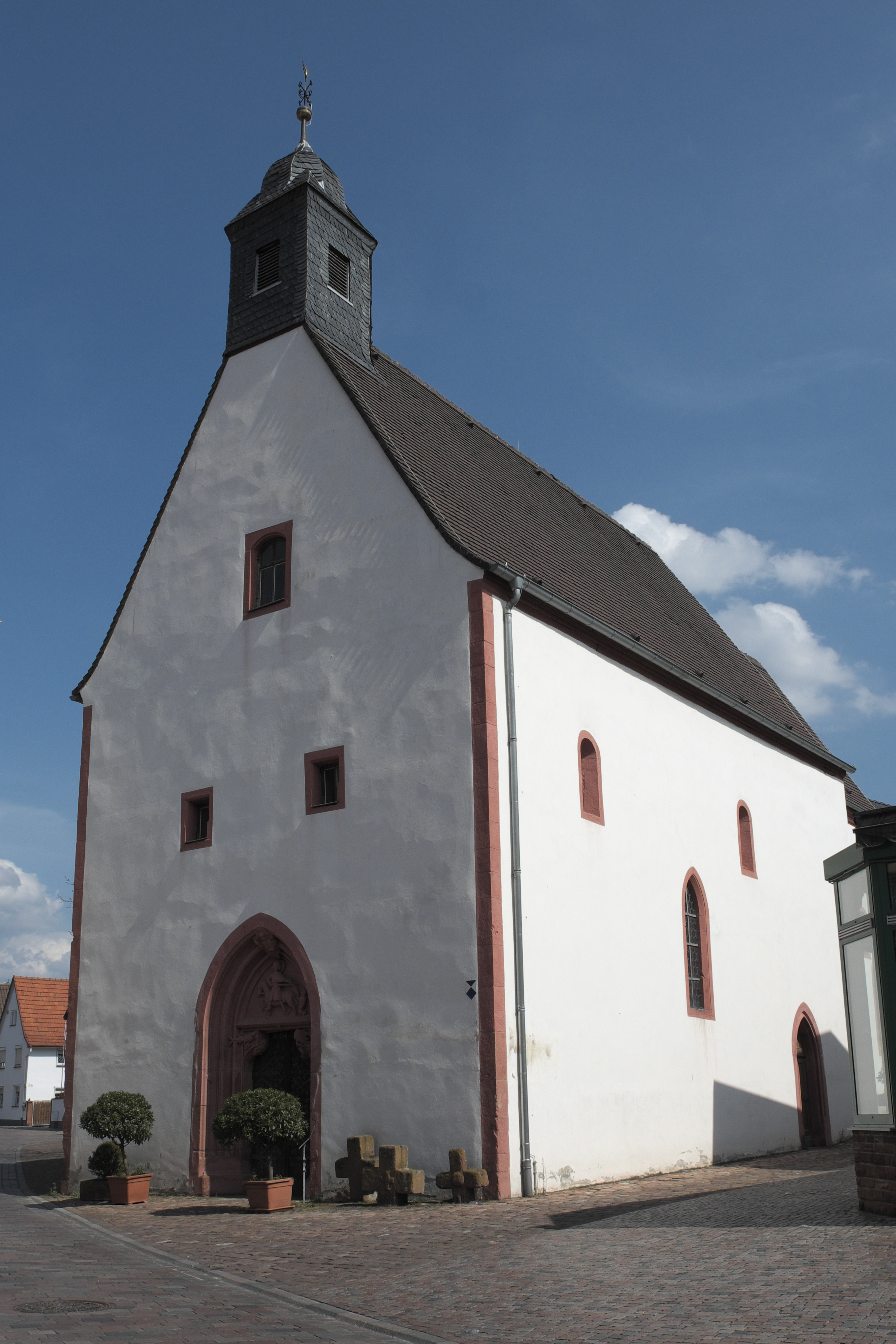 Katholische Martinskapelle in Bürgstadt im Landkreis Miltenberg (Unterfranken/Bayern)